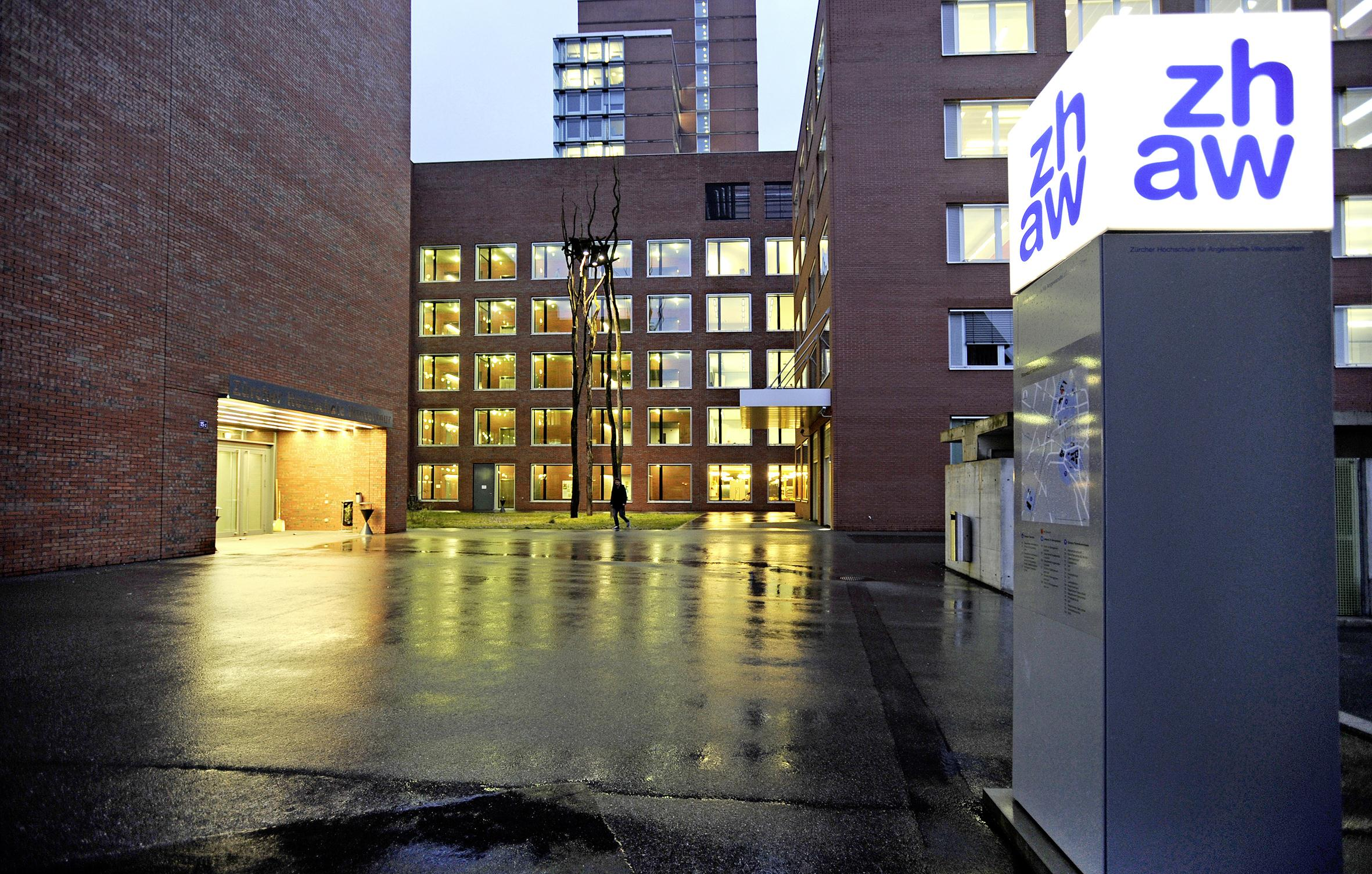 ZHAW - Zürcher Hochschule für angewandte Wissenschaften (in Winterthur). Eingang des Departements Angewandte Linguistik